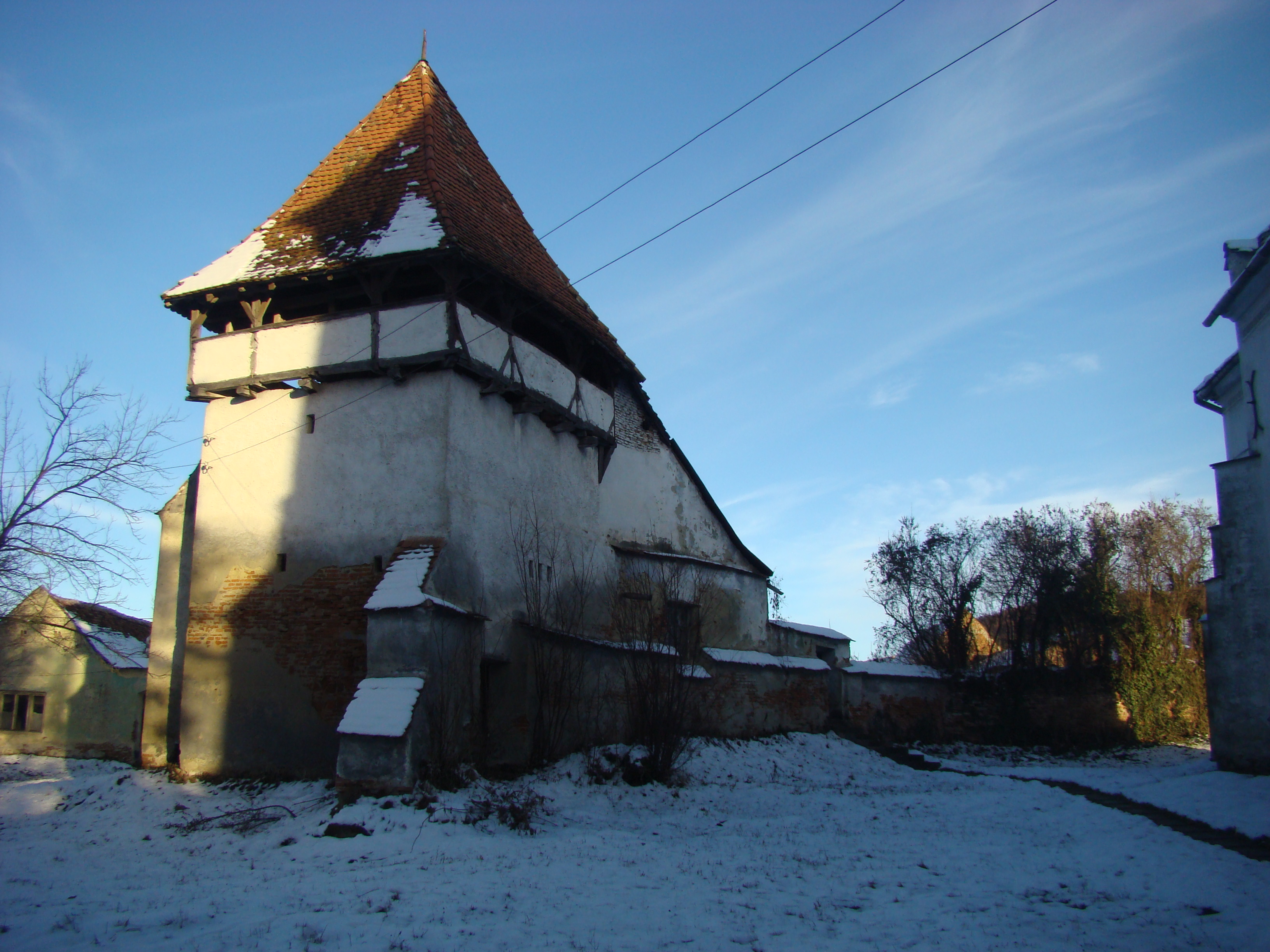 Biserica evanghelică fortificată din Metiș, județul Sibiu